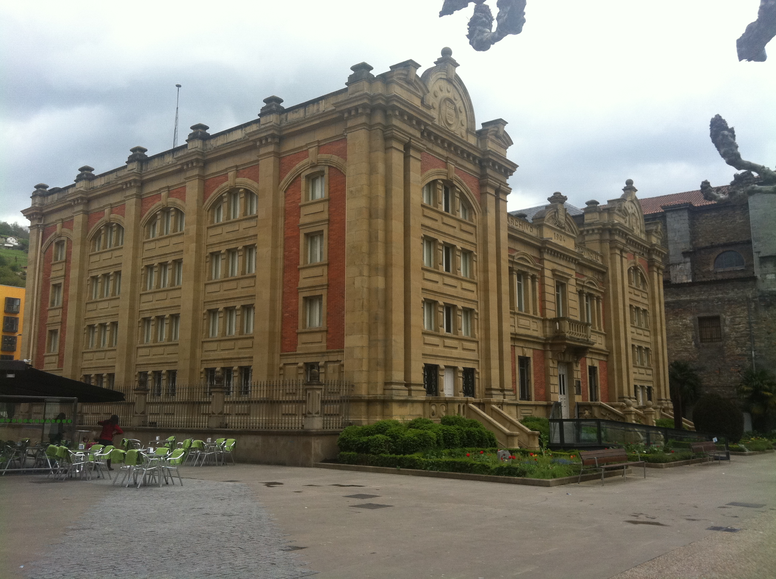 Tolosa Vistes generals